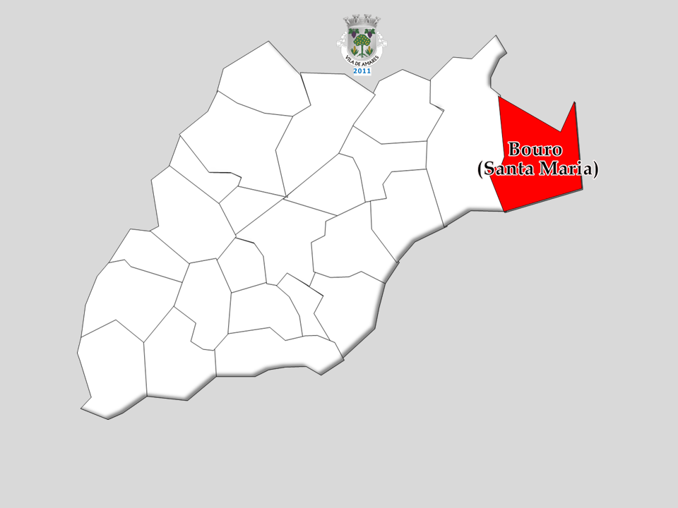 Censo 2011